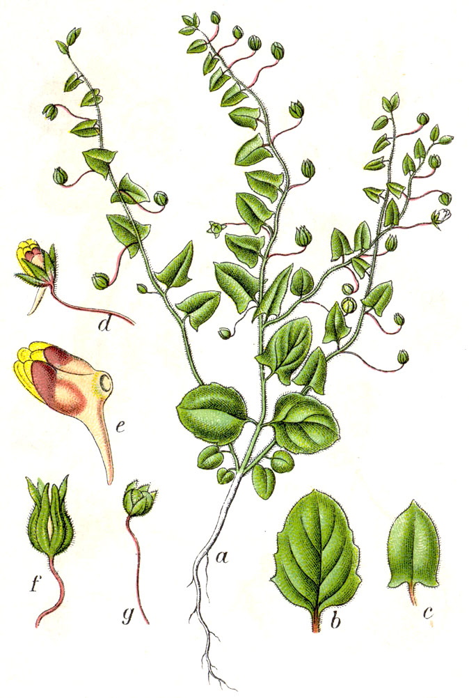 Kickxia elatine subsp. elatine, syn. Linaria elatine (L.) Mill., Antirrhinum elatine L. Original Caption Spiessblättriges Leinkraut, Antirrhinum elatine